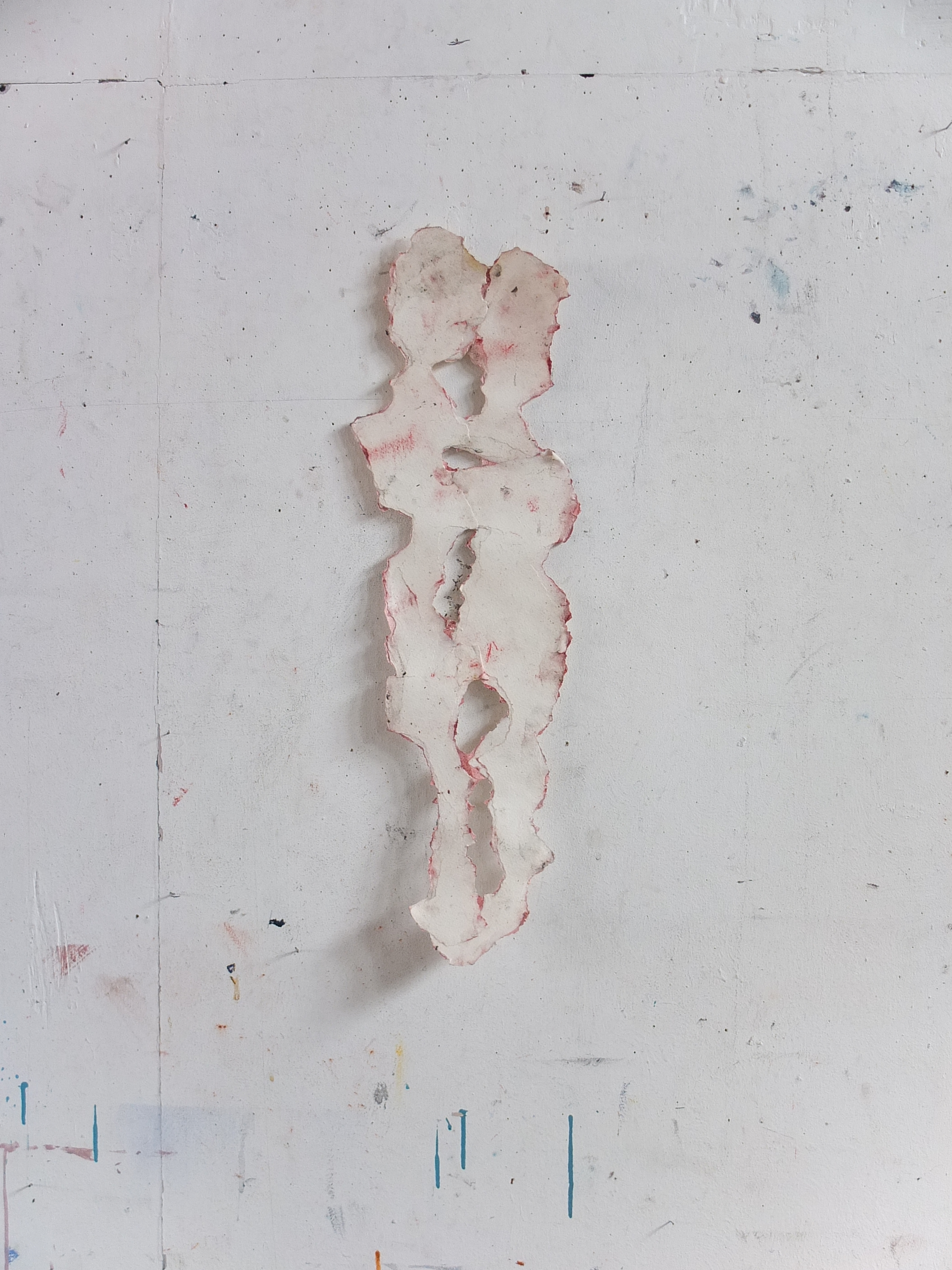 L'amour 2013